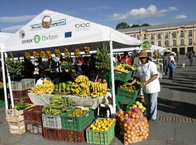 Escena en Mercado Campesino y Popular presencial en la ciudad de Bogotá D.C.